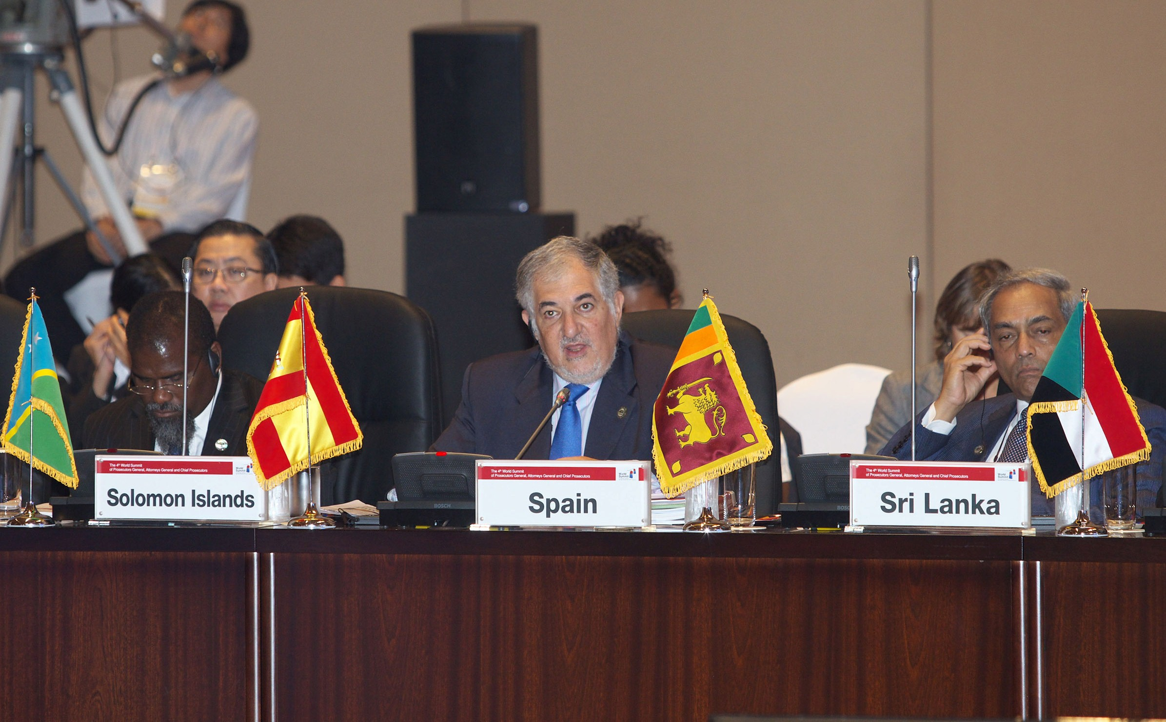 El Fiscal General del Estado español, interviniendo en la Cumbre Mundial de Fiscales Generales de Seúl,Corea, en 2011.